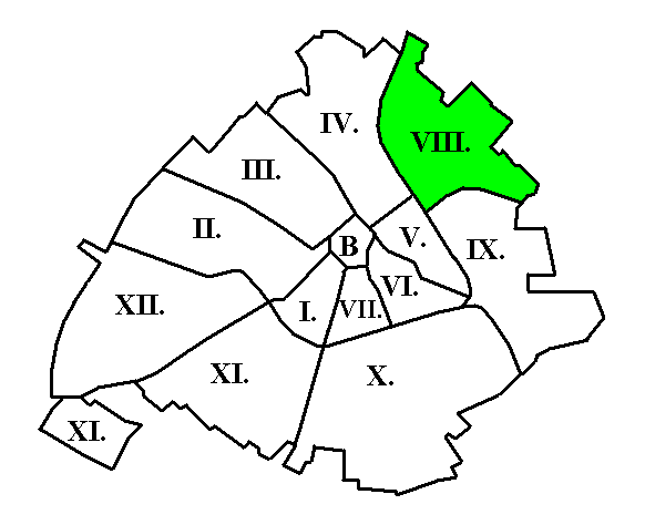 Kecskemét, VIII. kerület